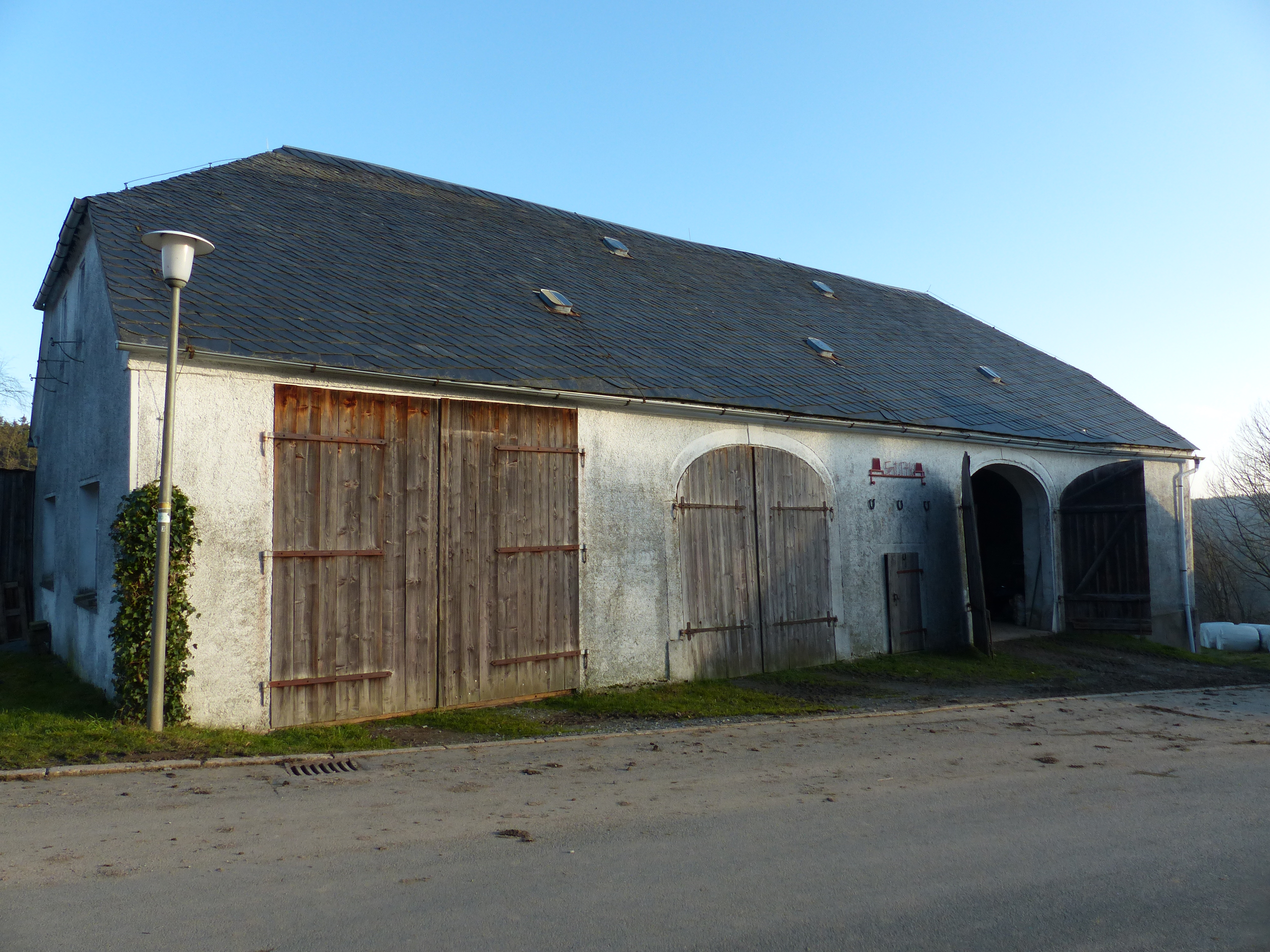 Ansicht von Rodeck